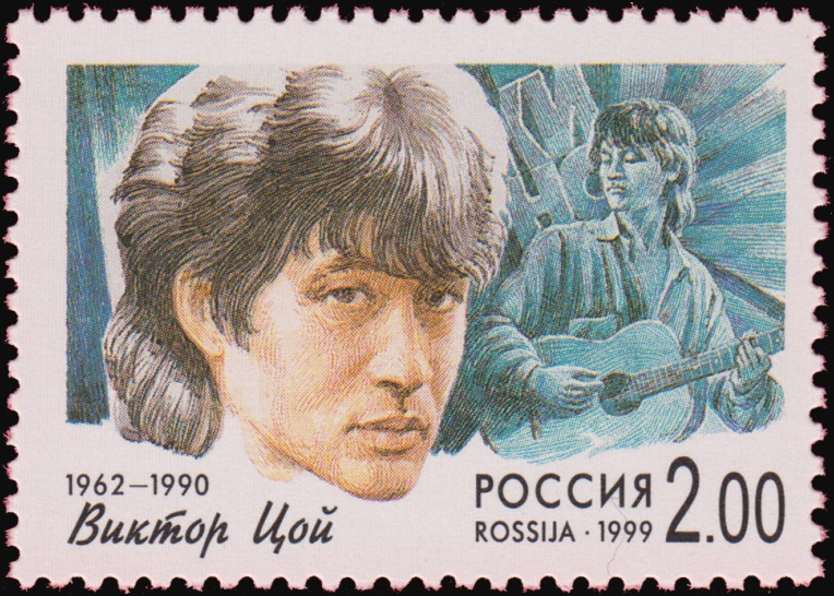 Виктор Цой.